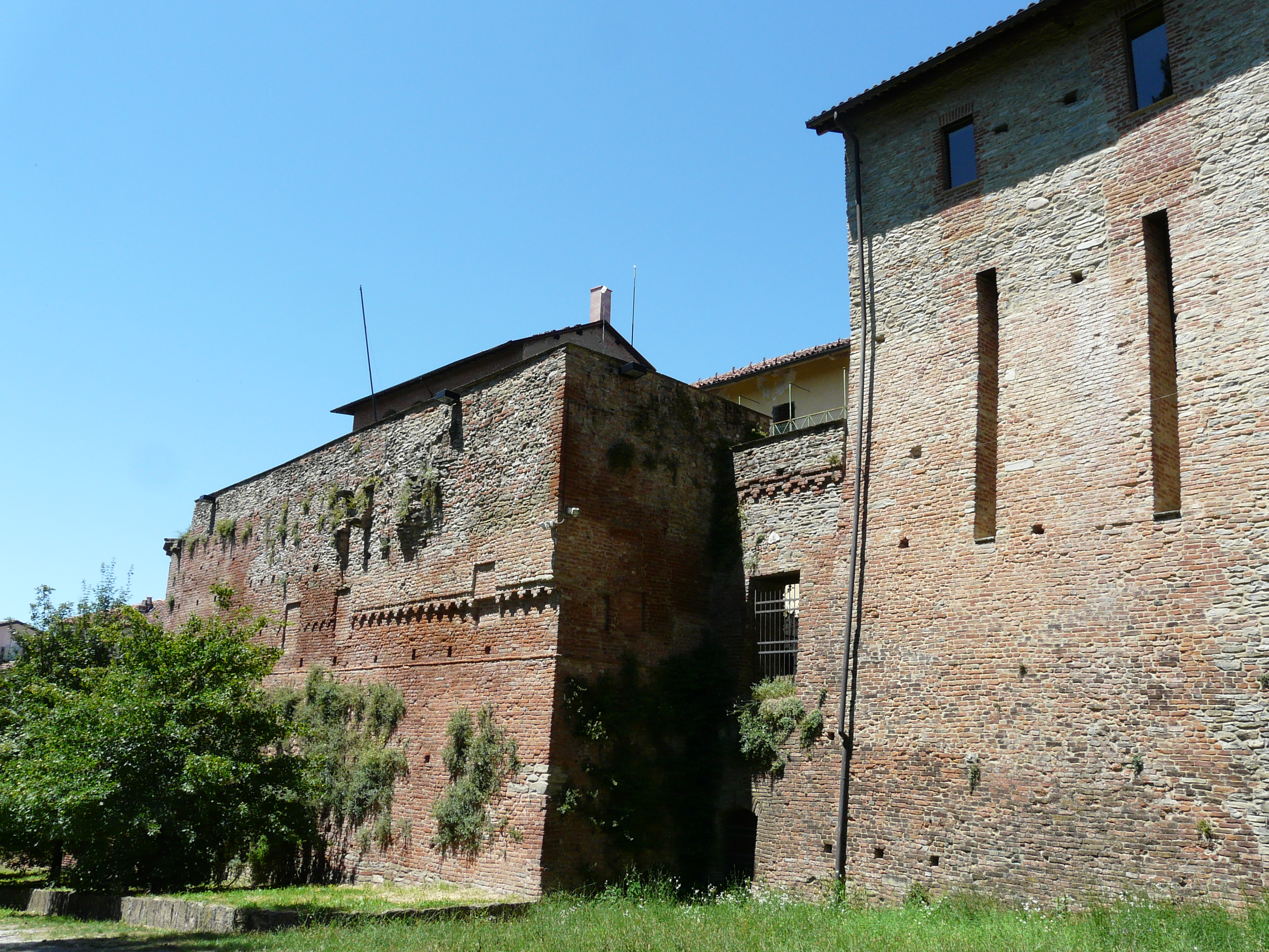 Castello dei Paleologi, Acqui Terme, Piemonte, Italia